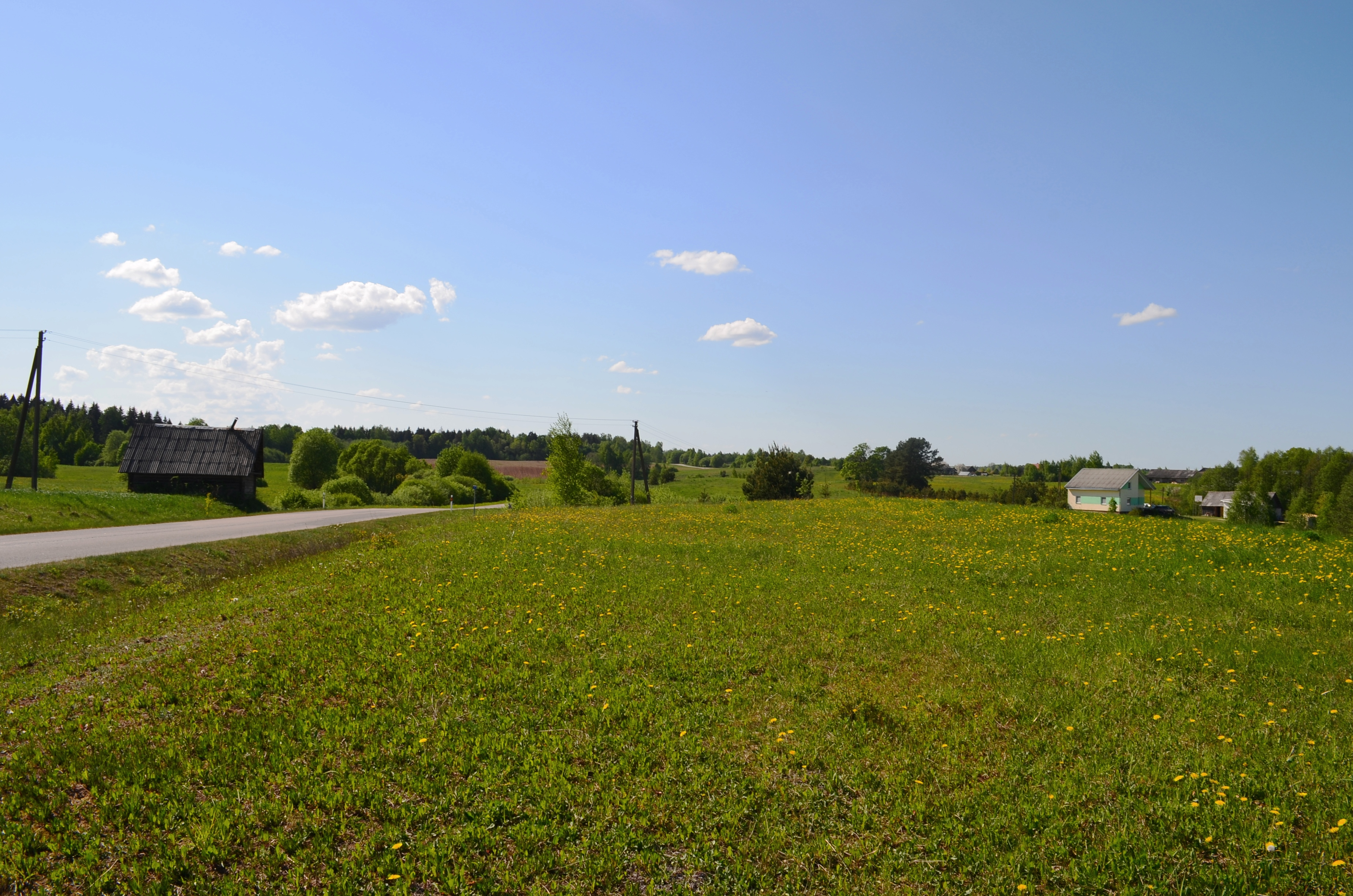 Miškiškiai II, Luokesos sen., Molėtų raj.